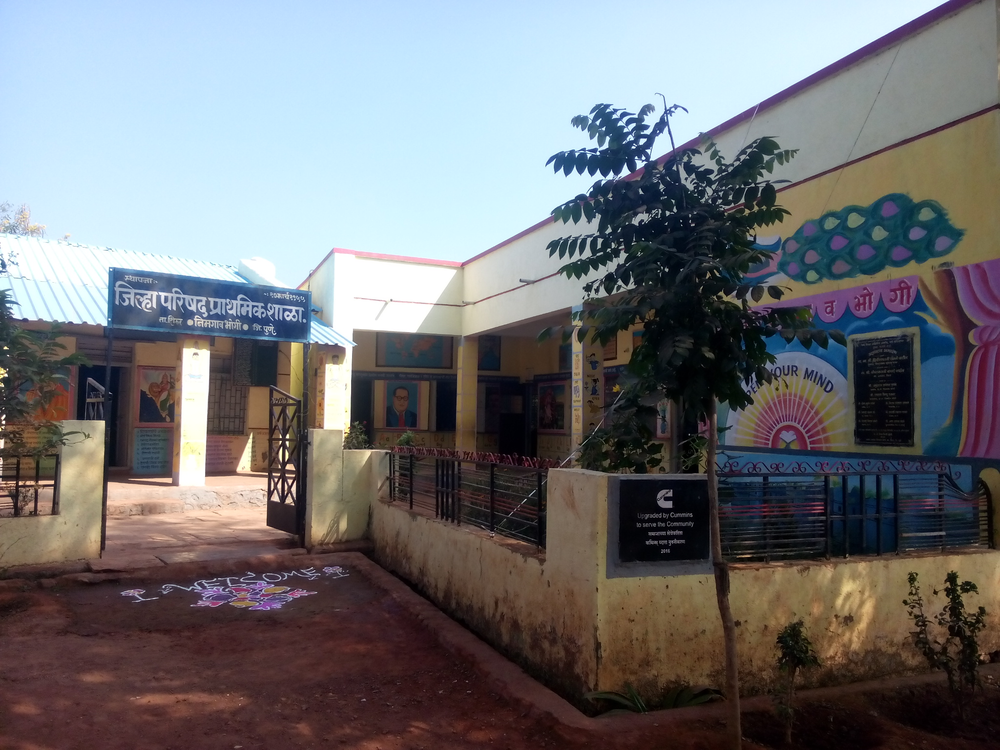 फोटो